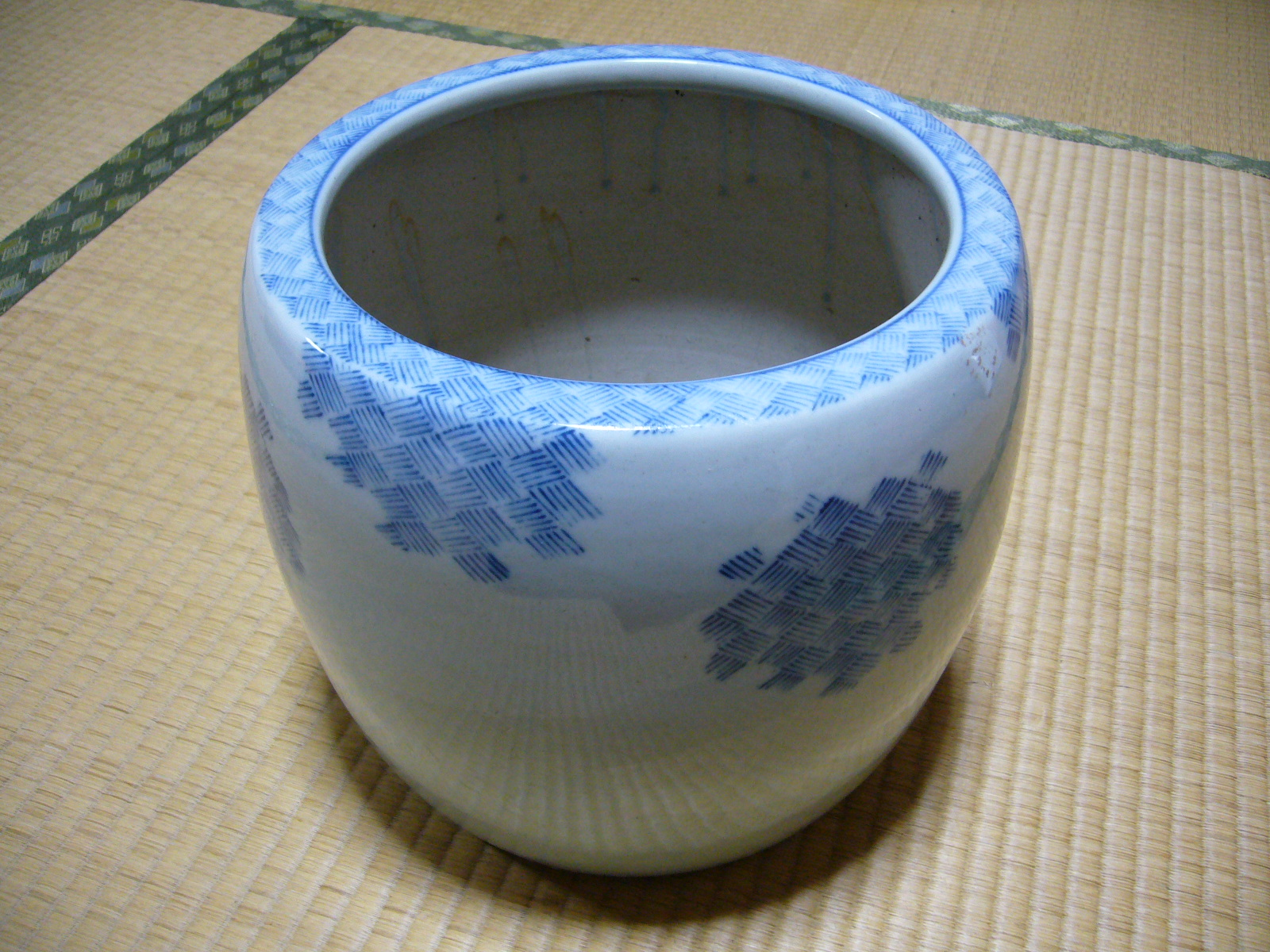 Charcoal brazier,hibachi,katori-city,japan